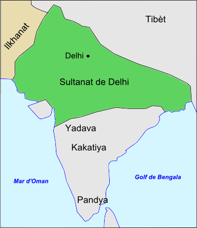 Sultanat de Delhi vèrs 1310.